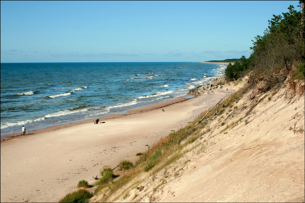 Baltic sea coast